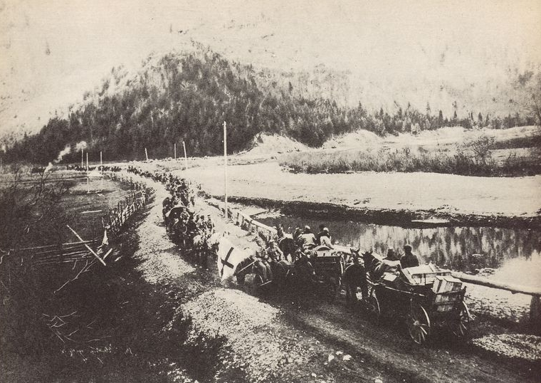 Walki II Brygady Legionów Polskich w Karpatach, transport rannych.